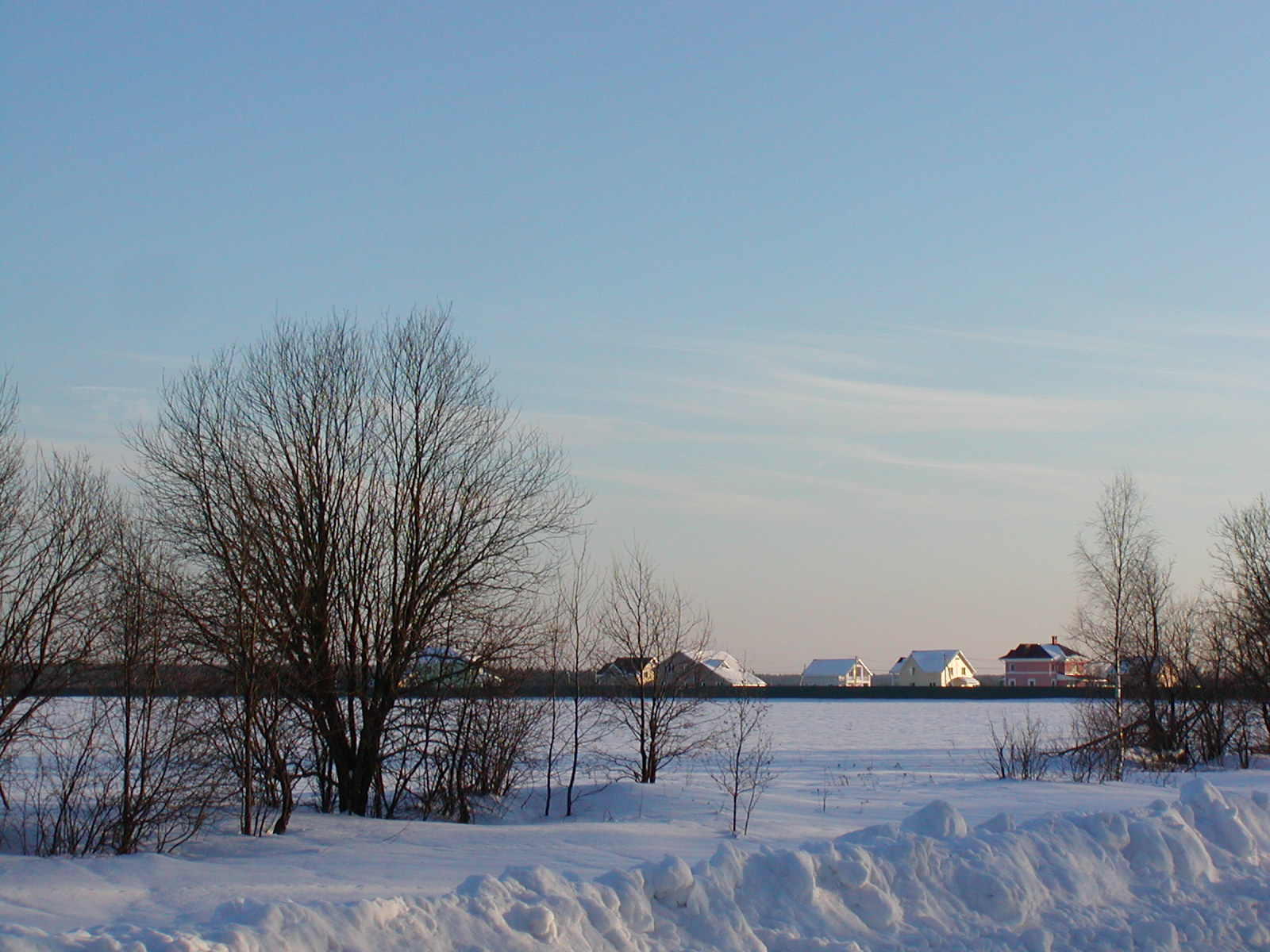 Коттеджный посёлок Зеленцино (Александровский район, Владимирская область)